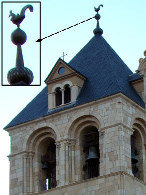 Detalle de la torre románica de la Basílica de San Isidoro de León (León, España). En todo lo alto puede apreciarse la réplica del gallo-veleta que se custodia en el museo del claustro como una pieza muy preciada.